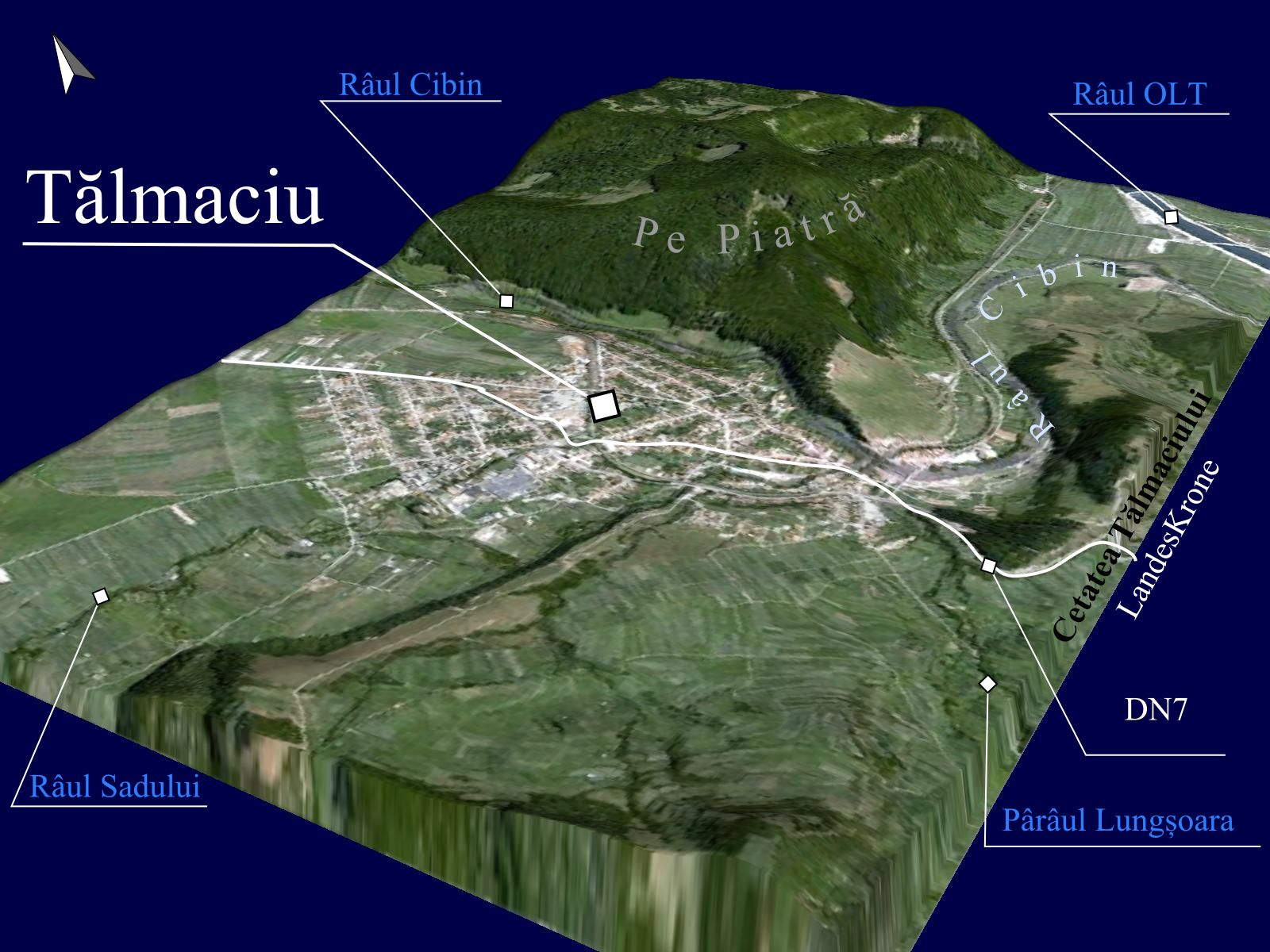 Prelucrare 3D pentru Tălmaciu, Sibiu.